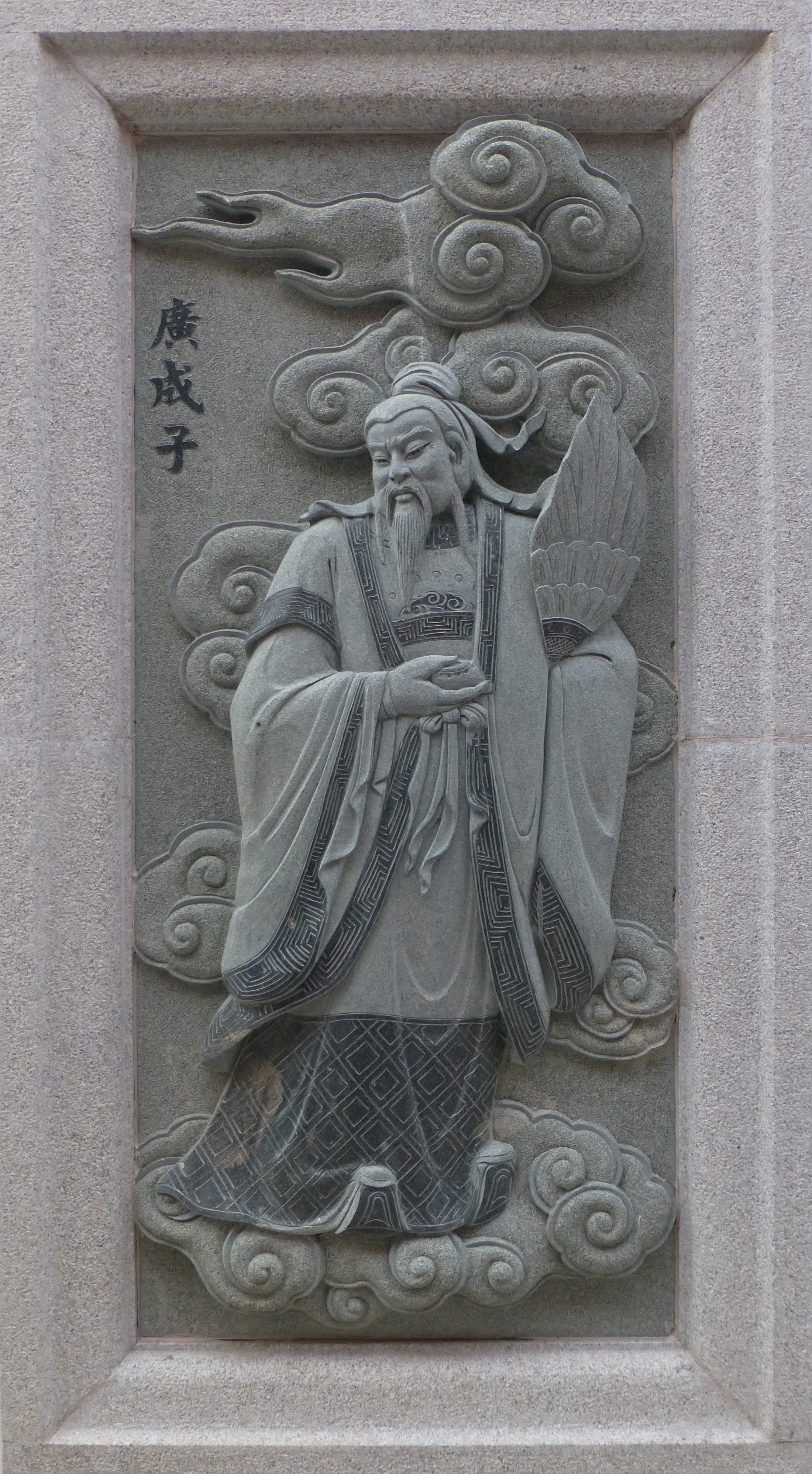 013 Guang Cheng Zi, Investiture of the Gods at Ping Sien Si, Pasir Panjang, Perak, Malaysia Photograph from the Ping Sien Si Temple in Perak, Malaysia taken by Anandajoti.